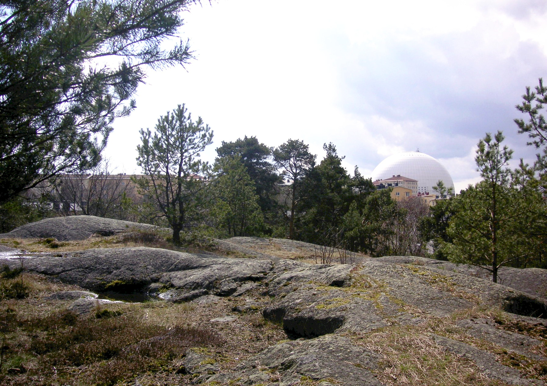 Galgbacken i Hammarbyhöjden, Stockholm med Globen i bakgrunden